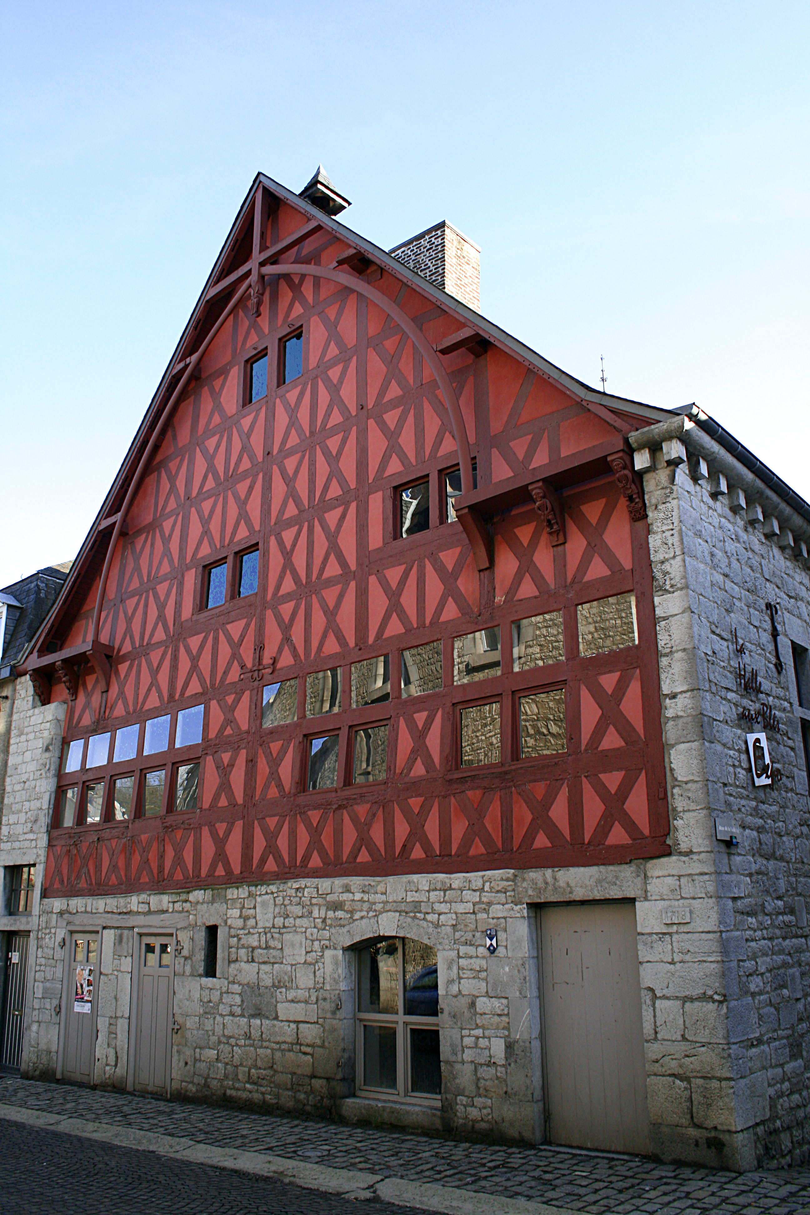 Durbuy (Belgique), la halle aux blés ou maison espagnole (1530).